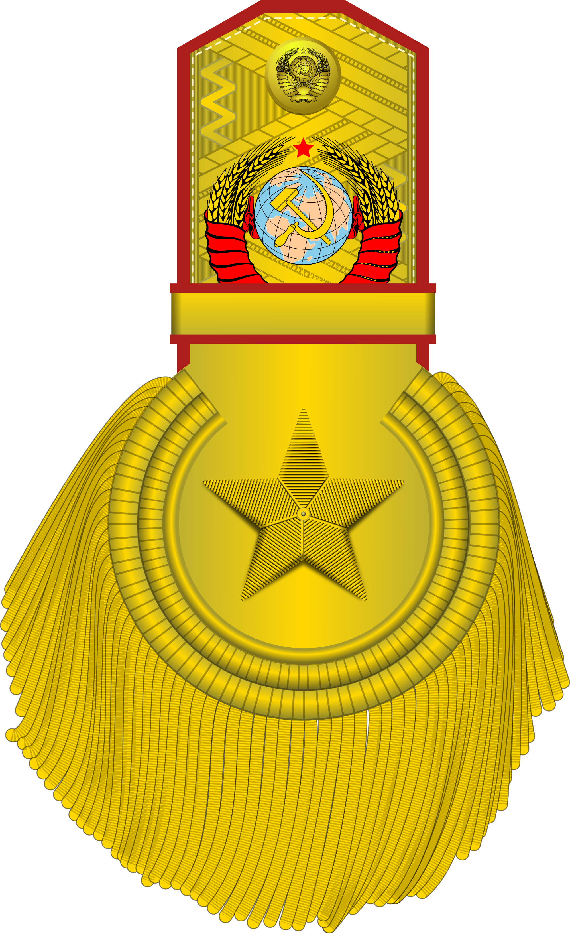 Погон Генералиссимуса Советского Союза, 1945